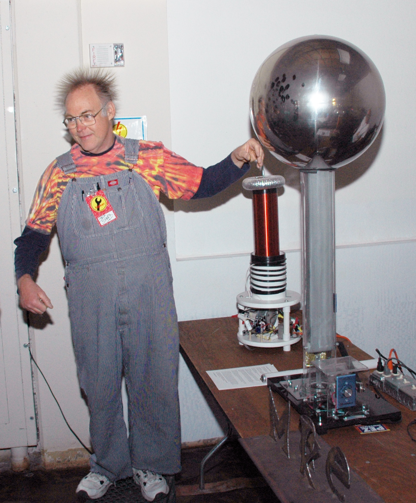 Maker Faire 2008, San Mateo - a Van de Graaff generator